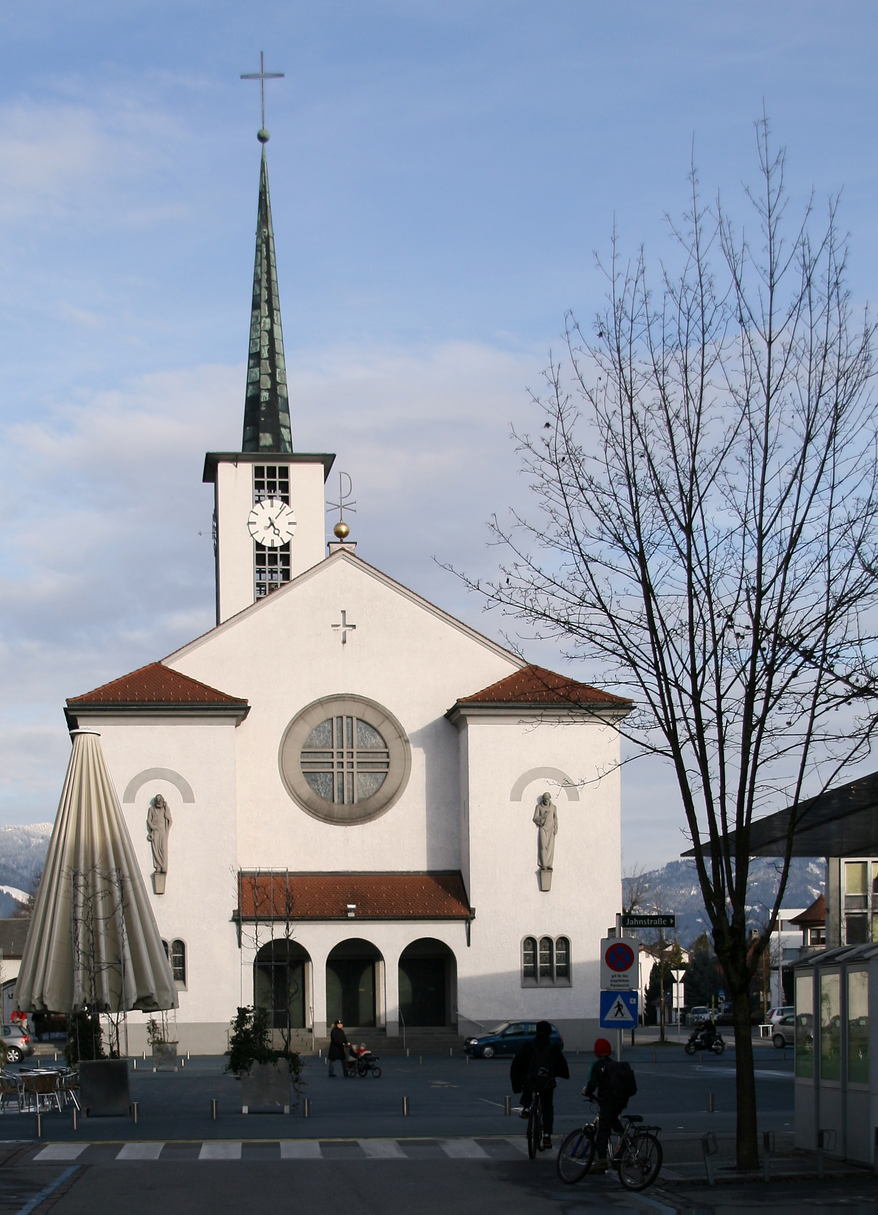 Pfarrkirche Hll. Peter und Paul, erbaut 1830 nach Plänen von Alois Negrelli in Lustenau, Vorarlberg .